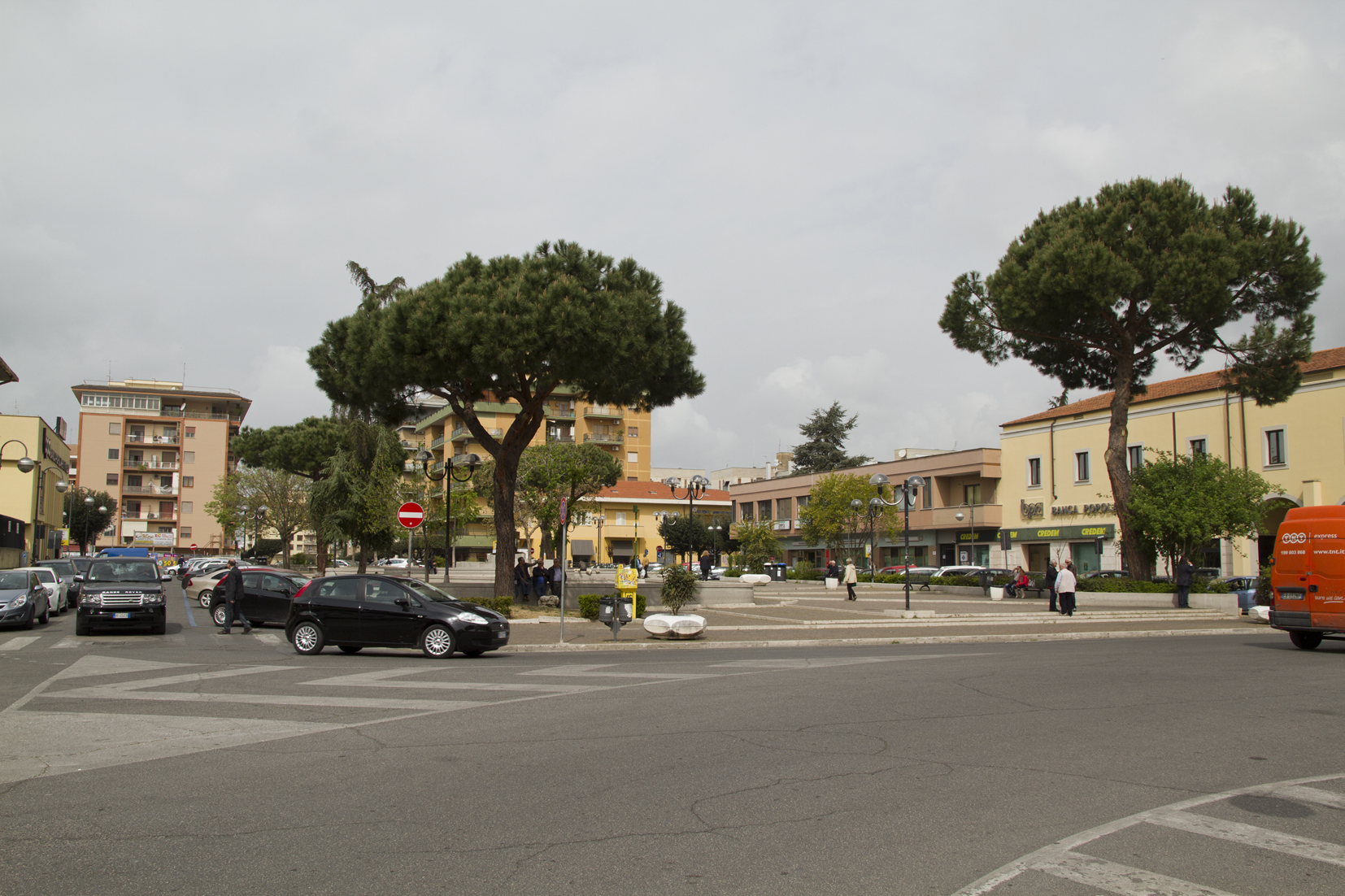 Piazza Roma, Aprilia LT, Lazio, Italy